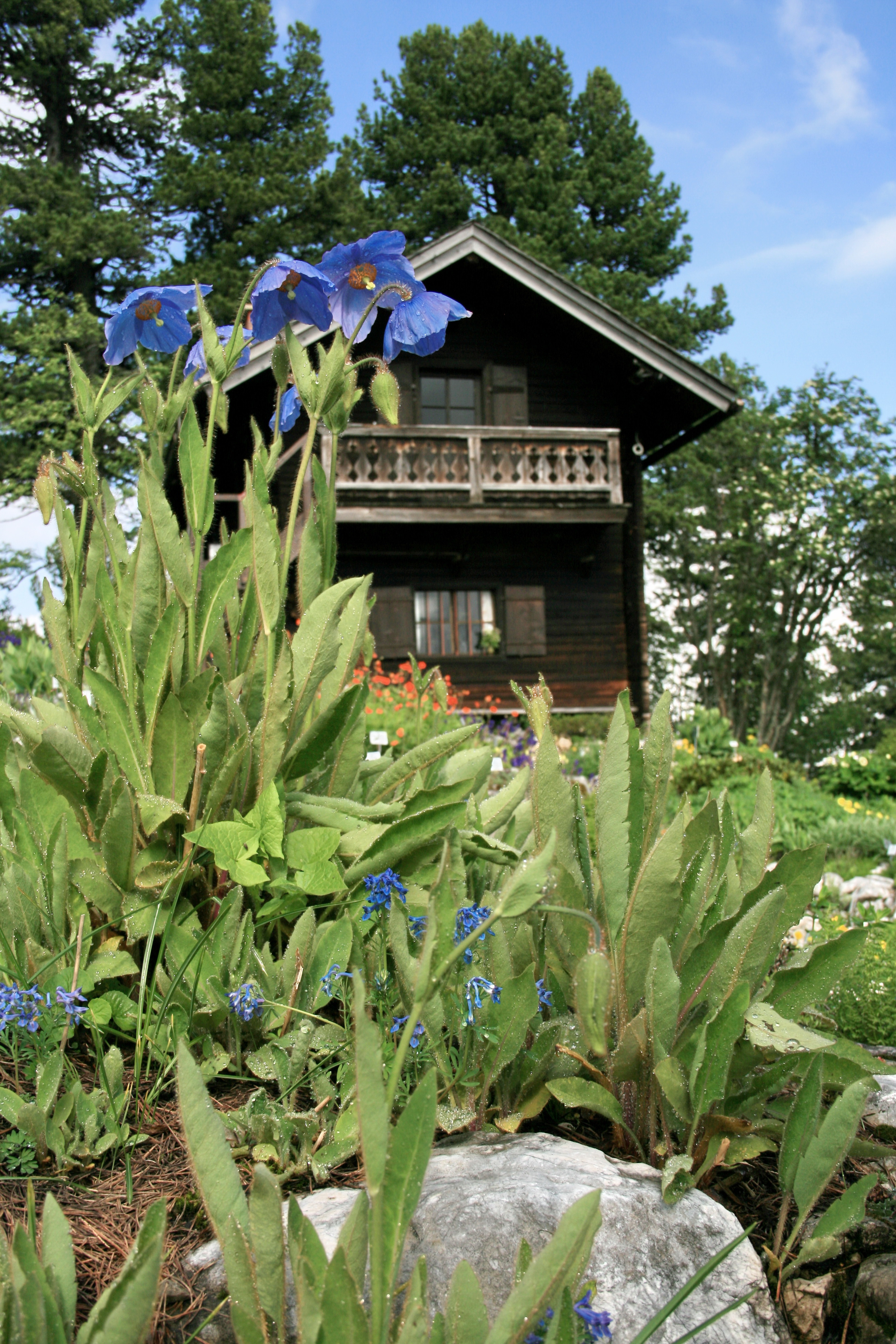 Gaertnerhaus im Alpengarten